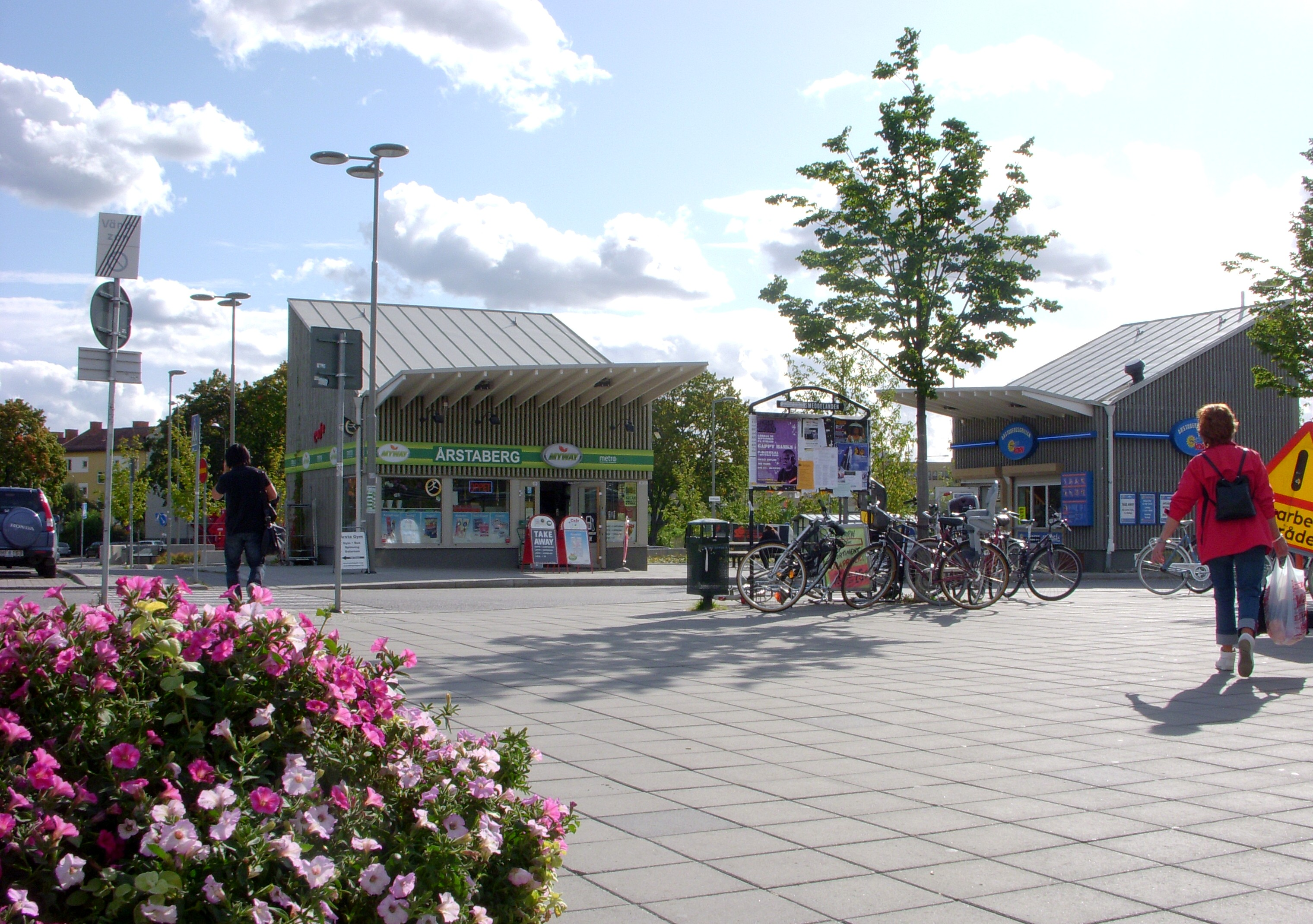 Årstabergs pendeltågstation i Årtsa, Stockholm